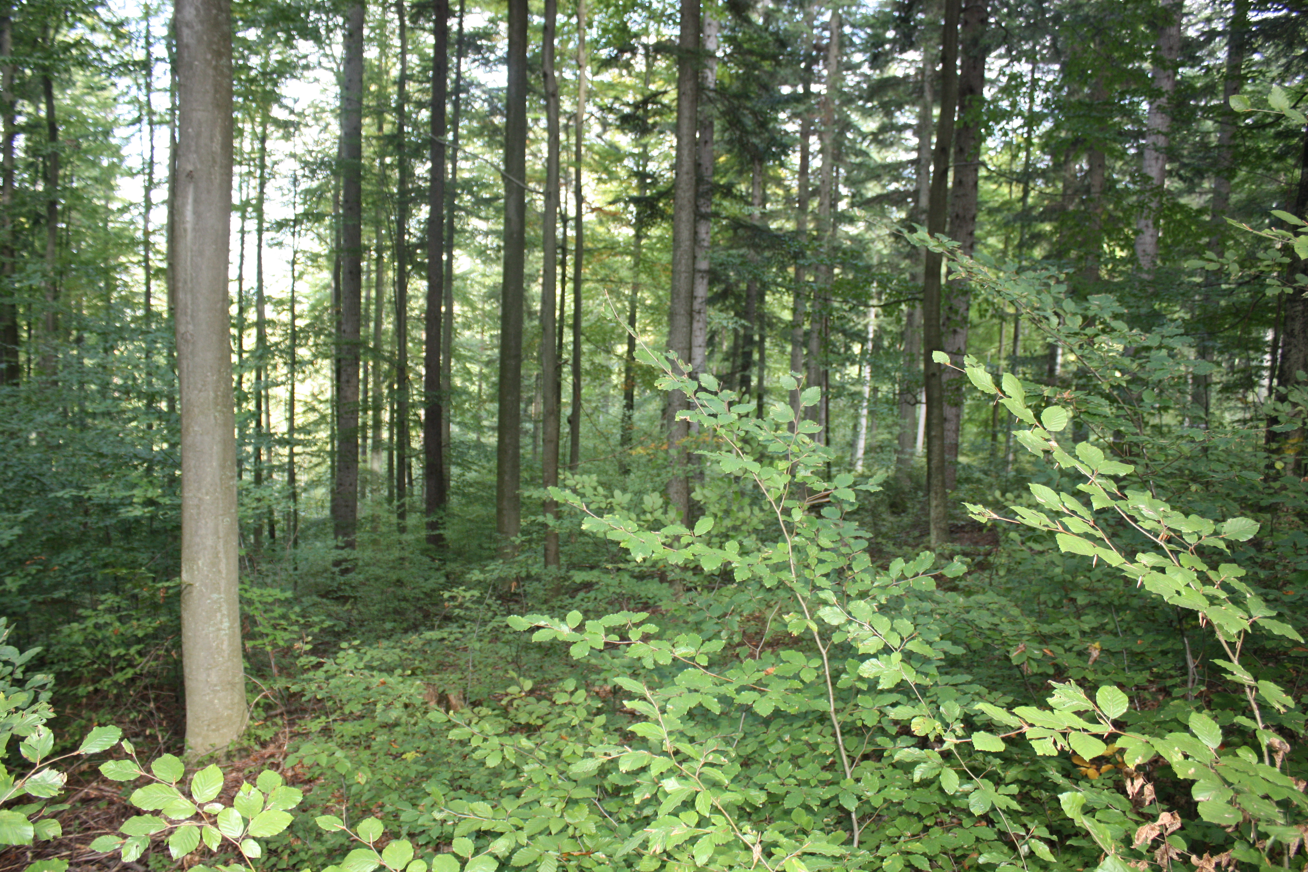 Smolnícka Huta